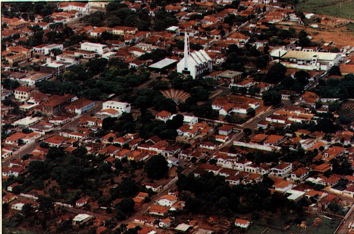 Vista aÃ©rea do Centro da cidade do Prata.